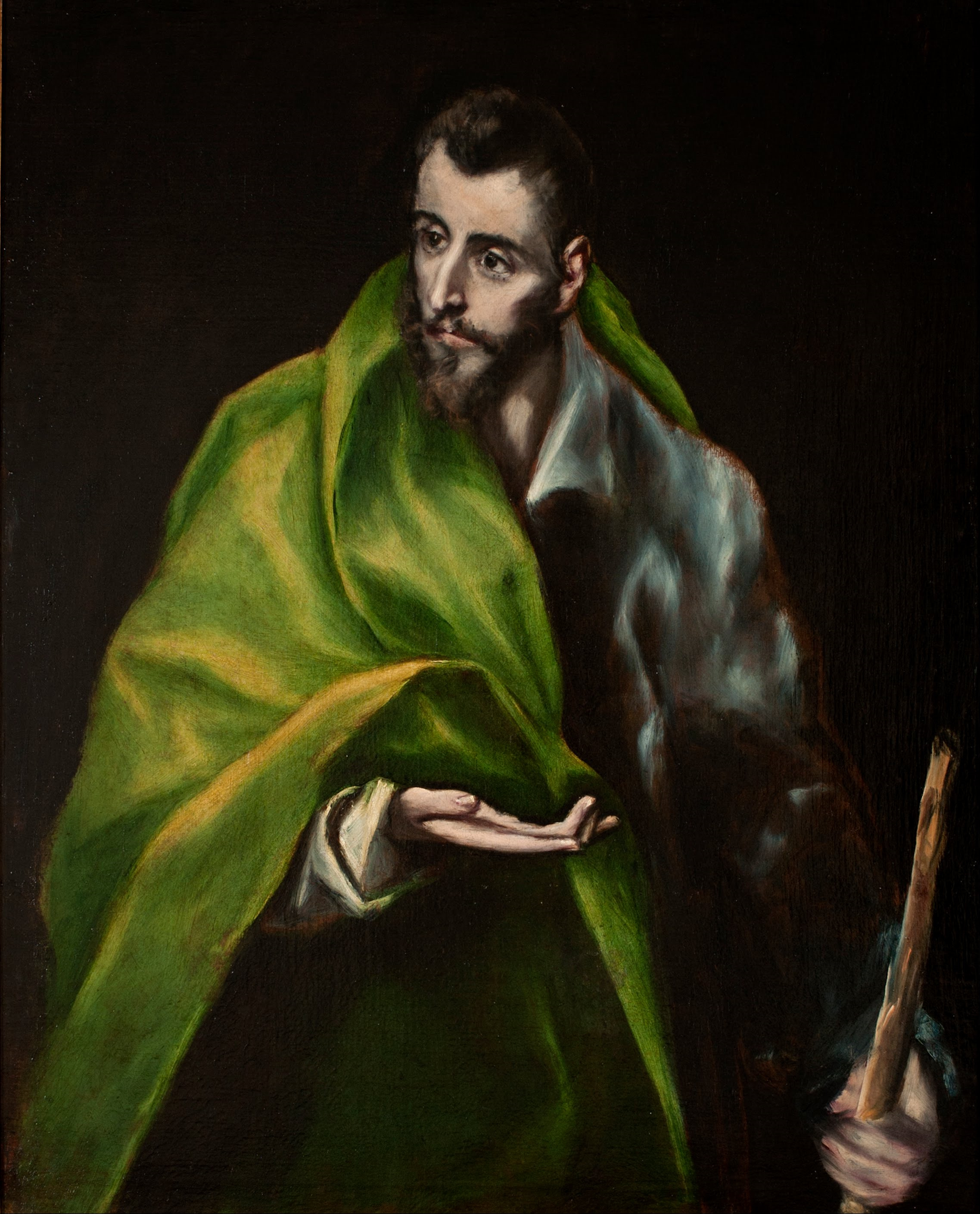 La obra representa a Santiago el Mayor, uno de los doce apóstoles de Jesucristo y decapitado en Jerusalén por orden del rey Herodes Agripa I.